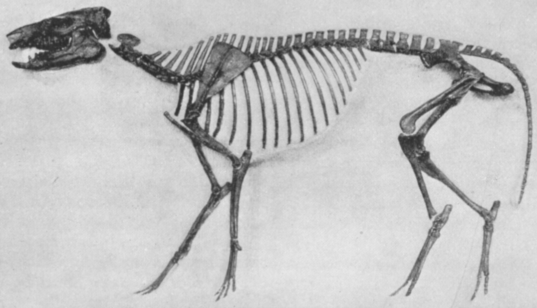 Protorohippus venticolum skeleton.